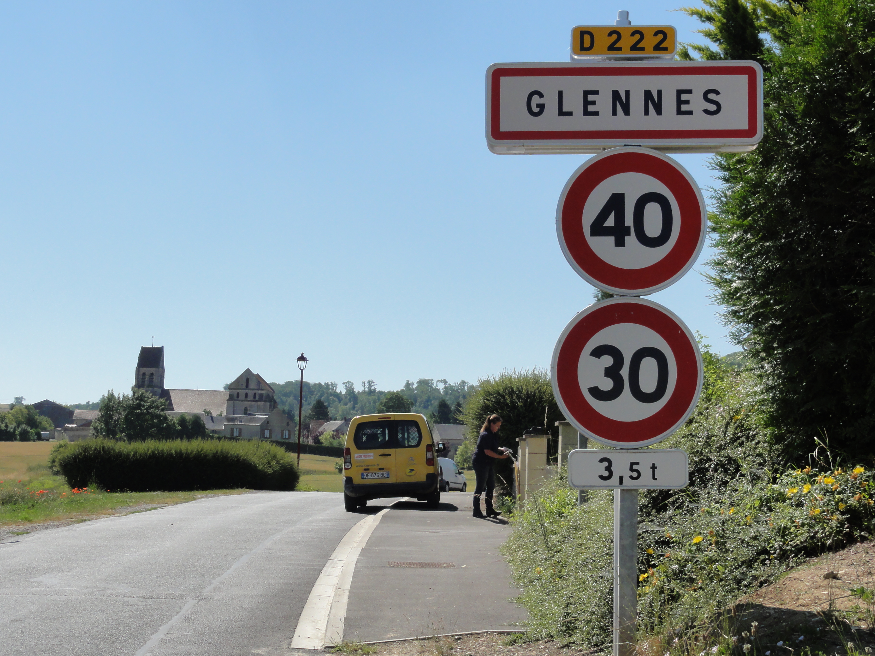 Glennes (Aisne) city limit sign